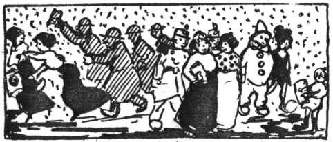 Dessin figurant la bataille de confetti à Paris.